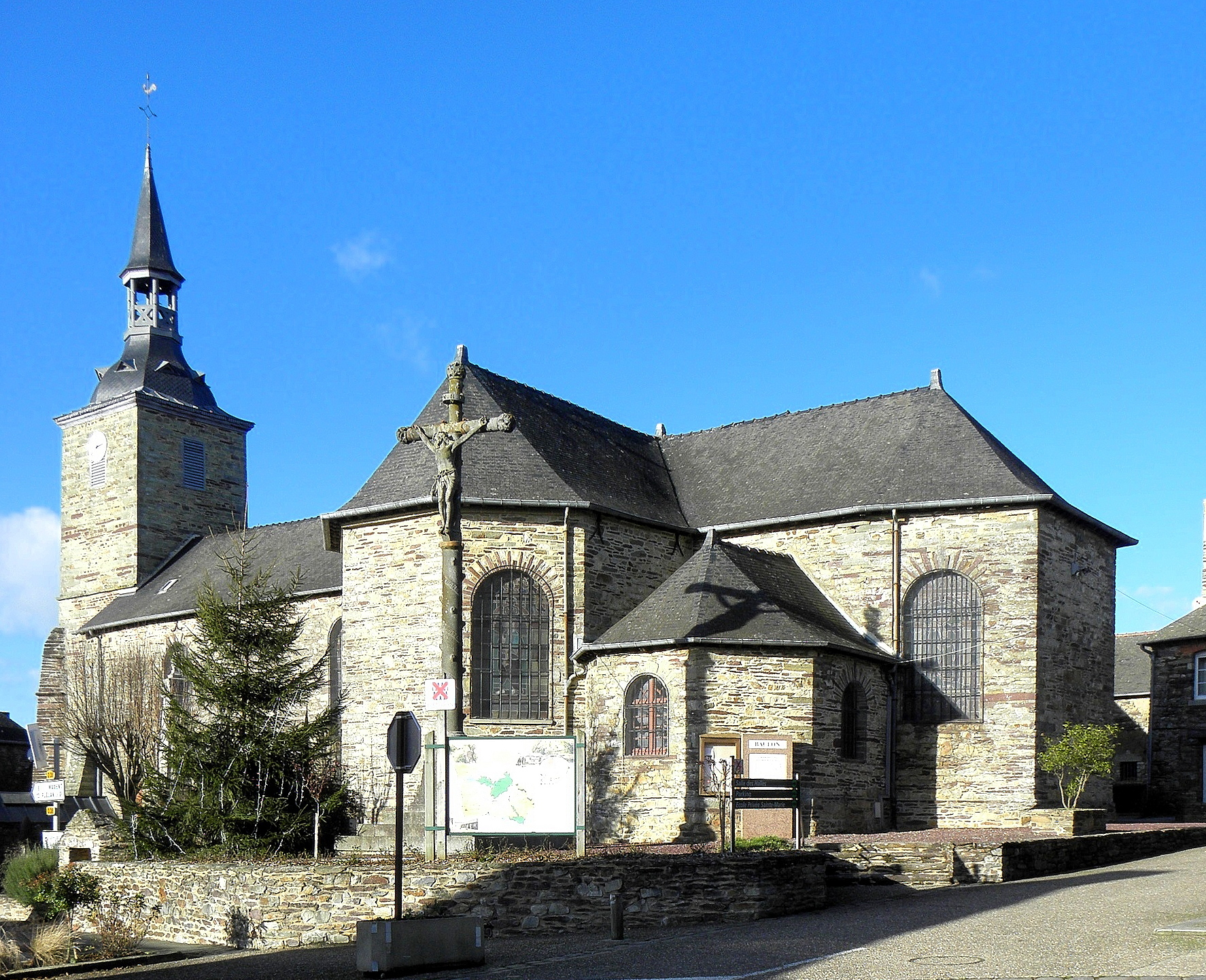 Église Saint-Tugdual de Baulon (35). Vue méridionale.